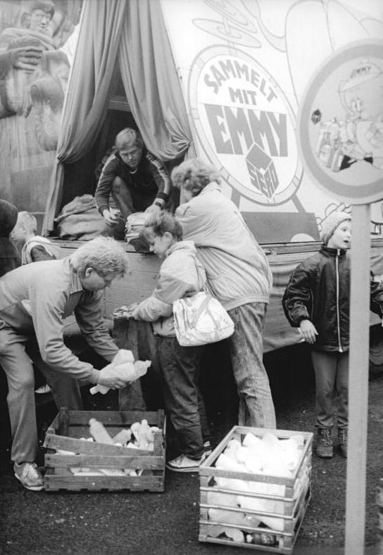 ADN-ZB Gehrmann 17.11.1988-Berlin: "Sammelt mit Emmy" Dieser buntgeschückte LKW des VEB Sero nahm im Stadtbezirk Prenzlauer Berg von Schülern gesammelte Altstoffe entgegen. Die Aktion war von der Pionierorganisation, der Frösi und dem Ankaufbetrieb organisiert worden.